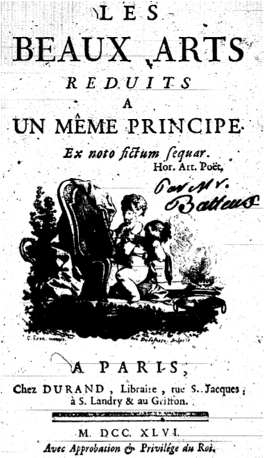 1st page of Les beaux-arts réduits à un même principe, 1746.